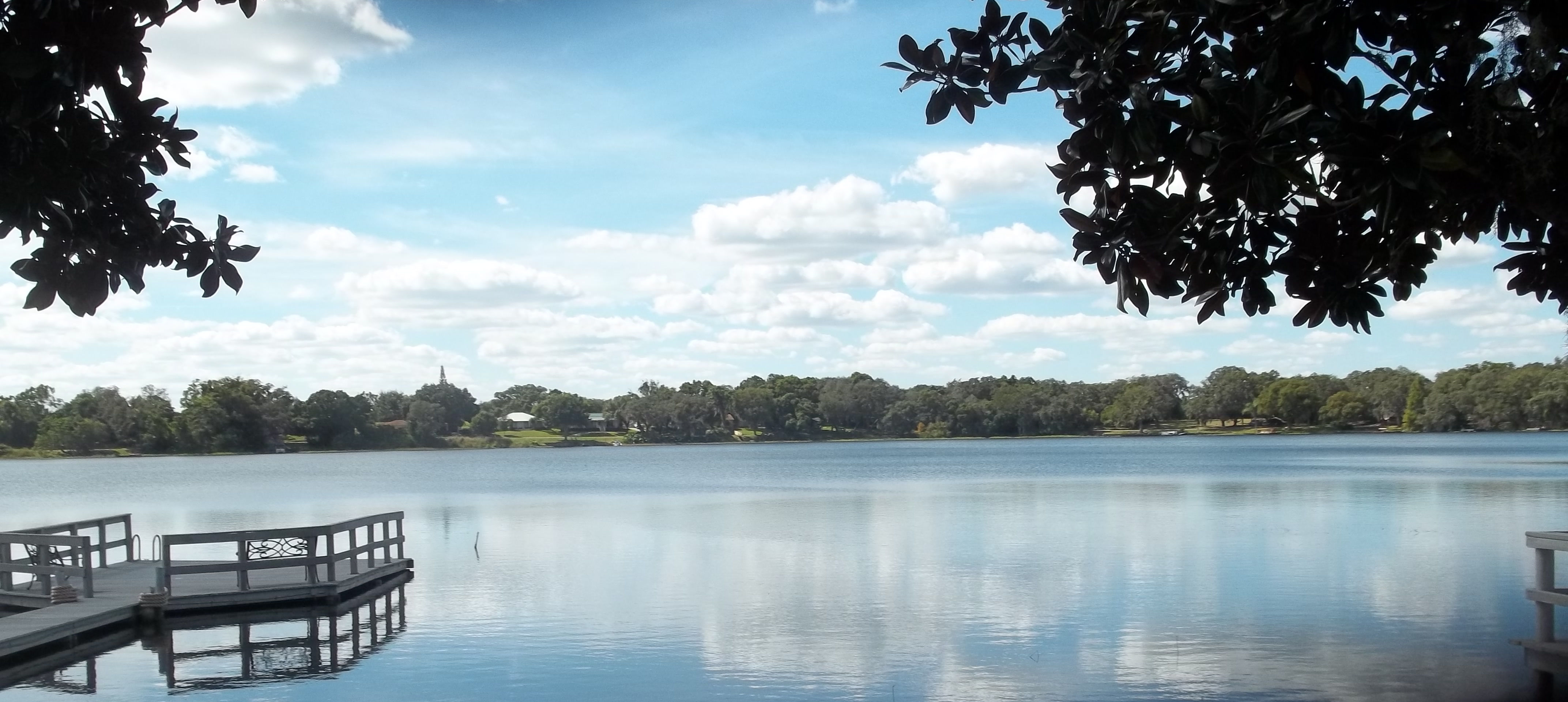 Avon Park, Florida: Lake Byrd